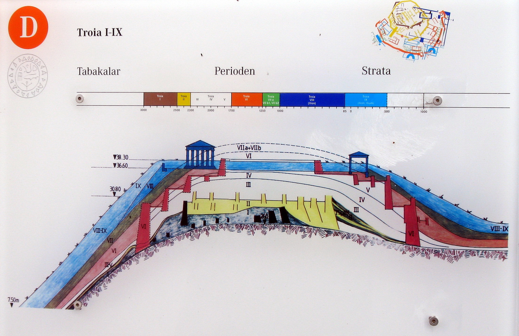 Troja - Schnitt durch den Grabungshügel Hisarlik